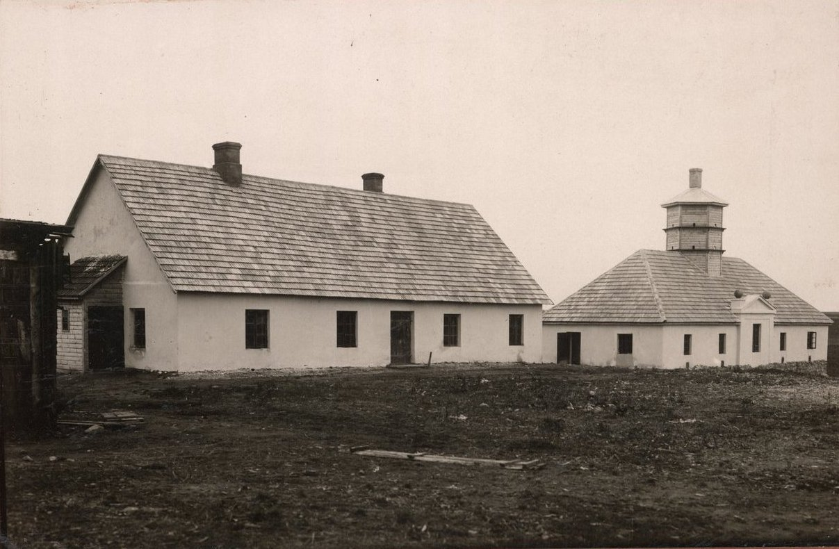 Budynki gospodarcze Niższej Żeńskiej Szkoły Rolniczej Sejmiku Suwalskiego w Kukowie.